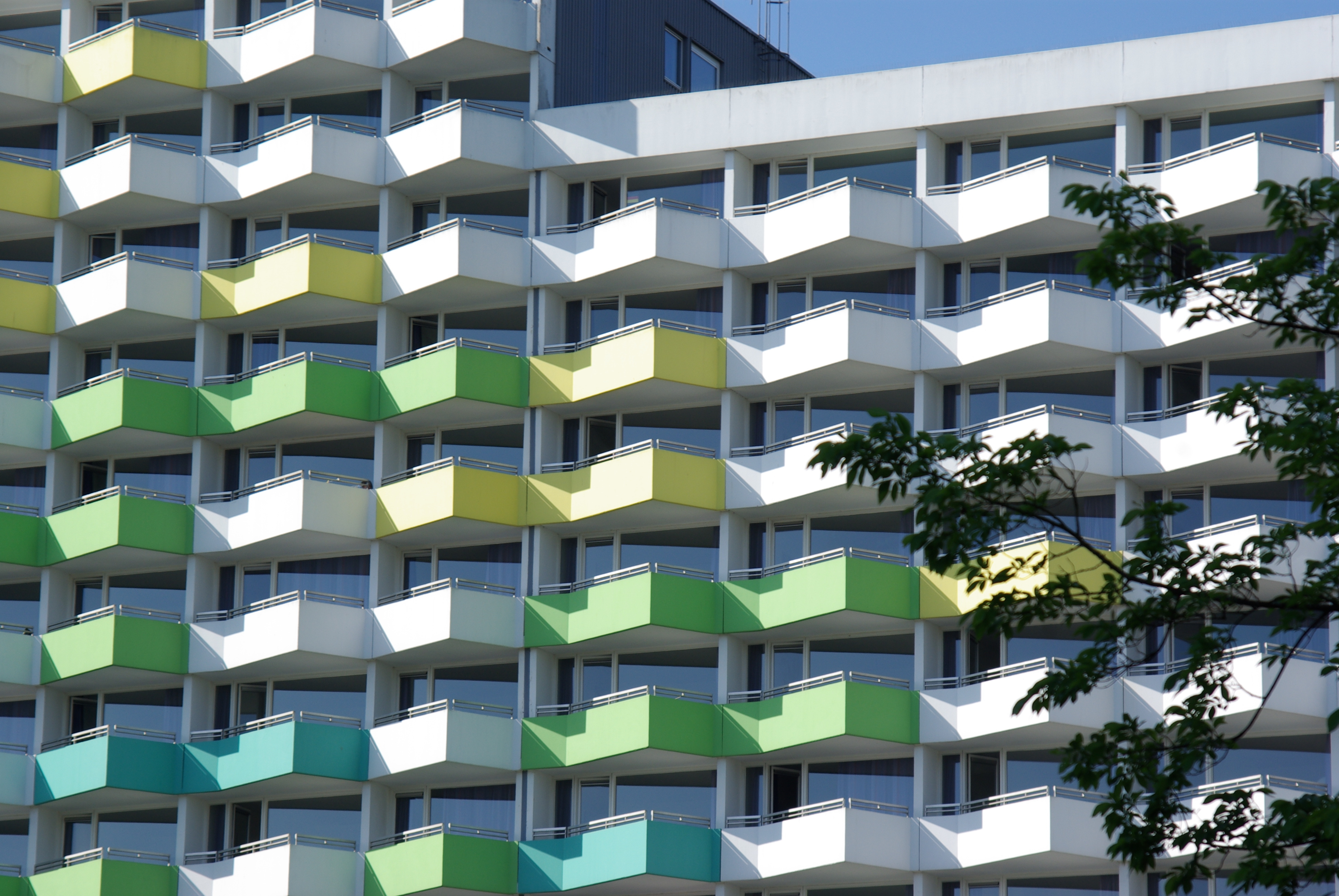 Damp in Schleswig-Holstein. Die Ostsee-Klink in Damp.